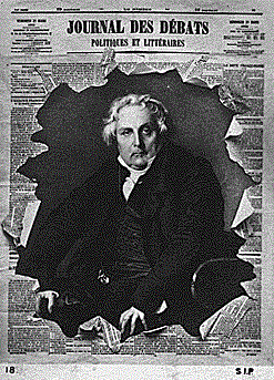 Journal des Débats - Portrait of Monsieur Bertin, director